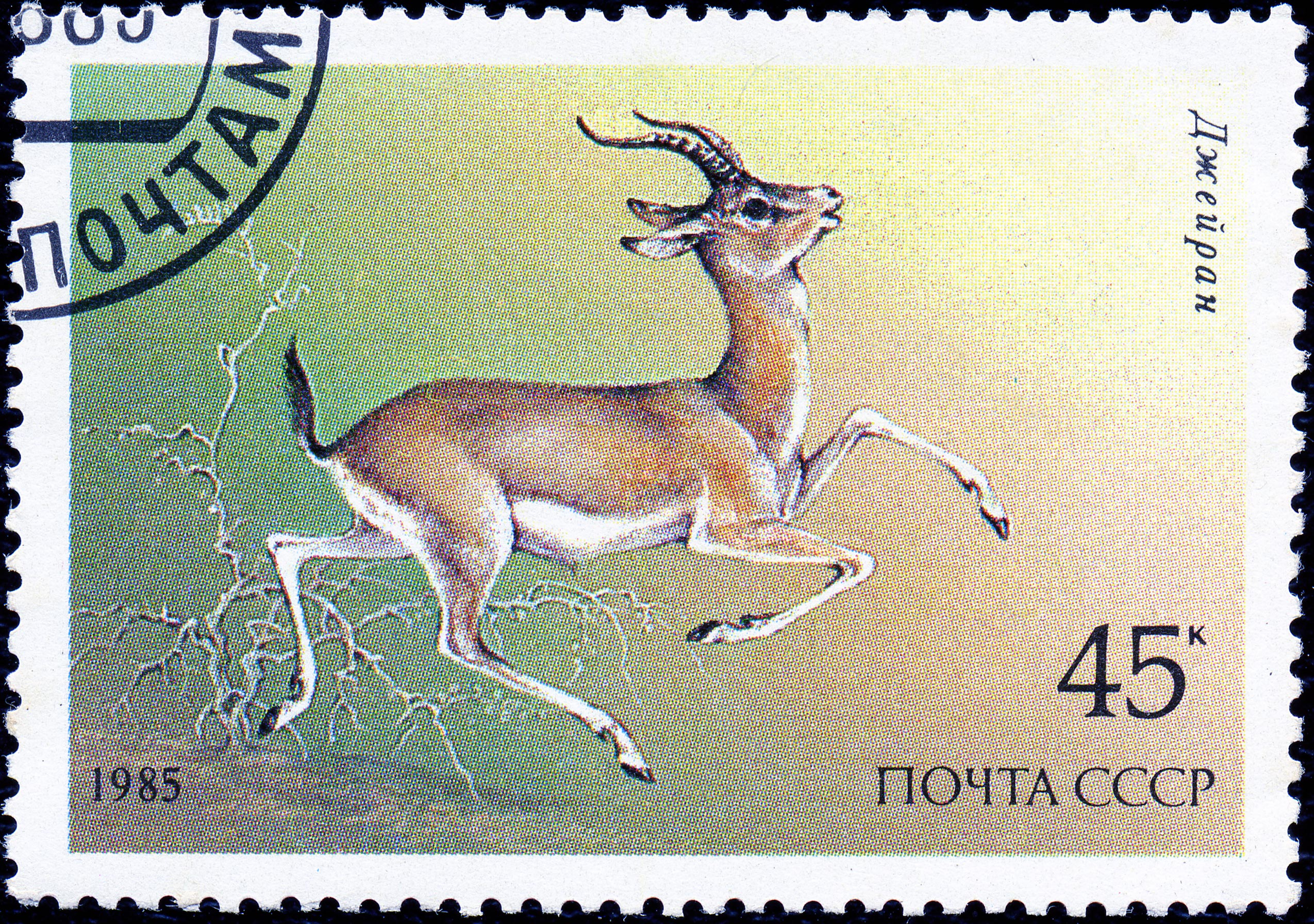 Почтовая марка СССР. 1985. Джейран